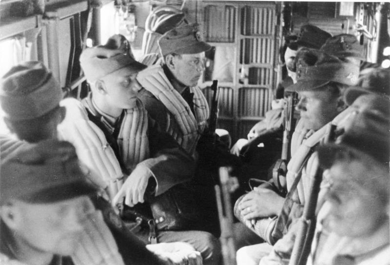 "Sie sind es schon gewohnt" Luftlandetruppen in unserer Transportmaschine (PK 690/5.Geb.Div.) - Kreta